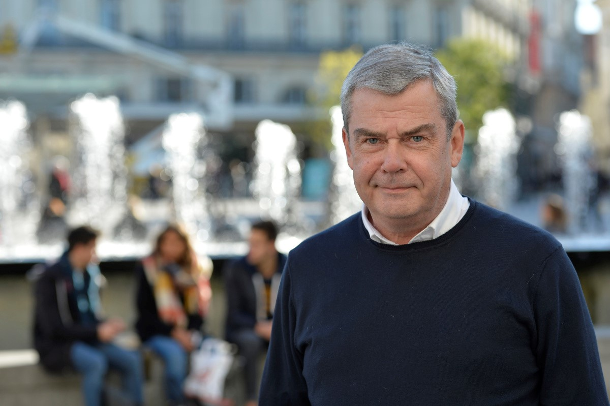 Philippe Nédélec, écrivain français